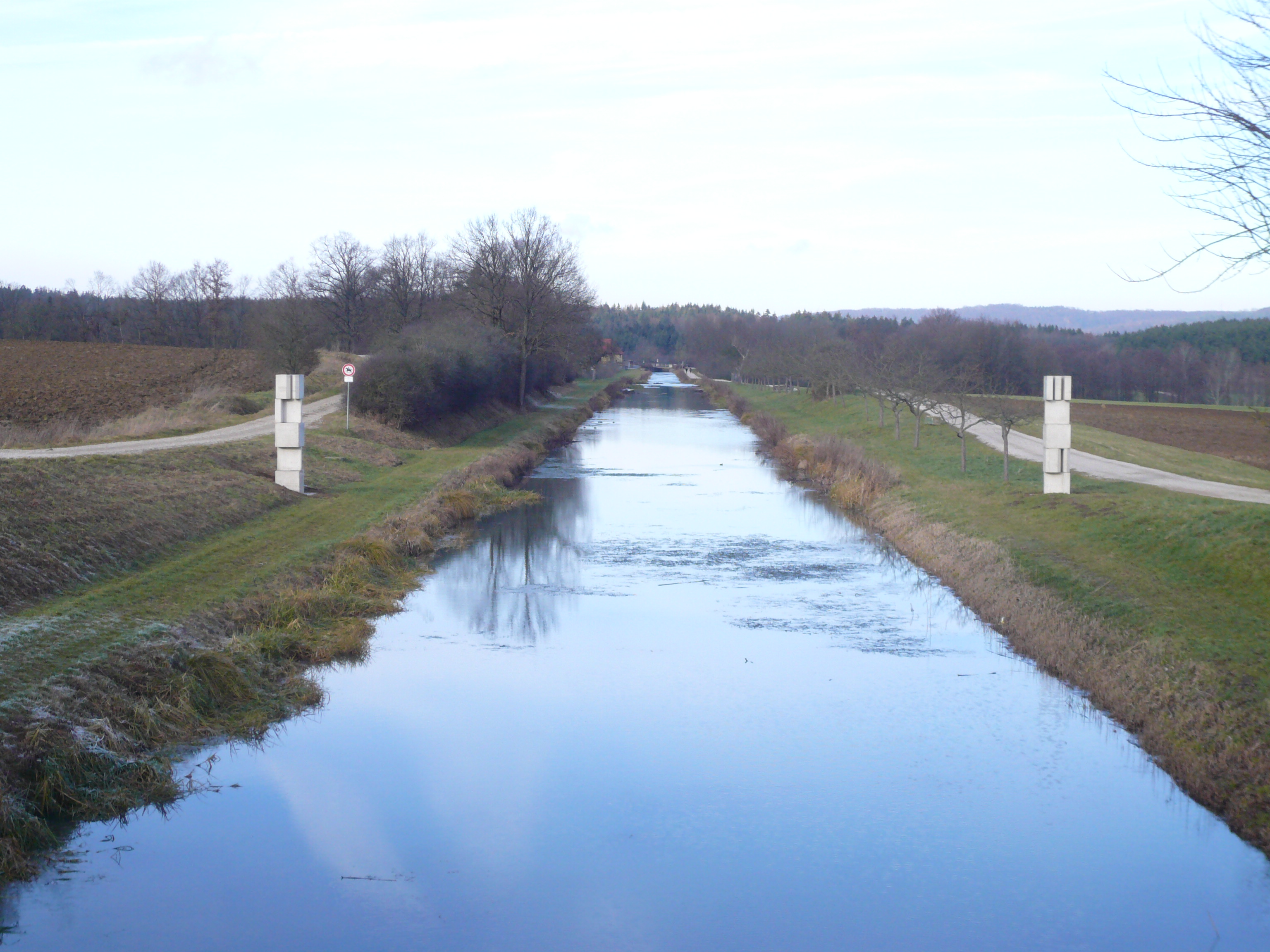 Kunstwerk von Timm Ulrichs, Titel: EINST STEIN am Ludwigkanal